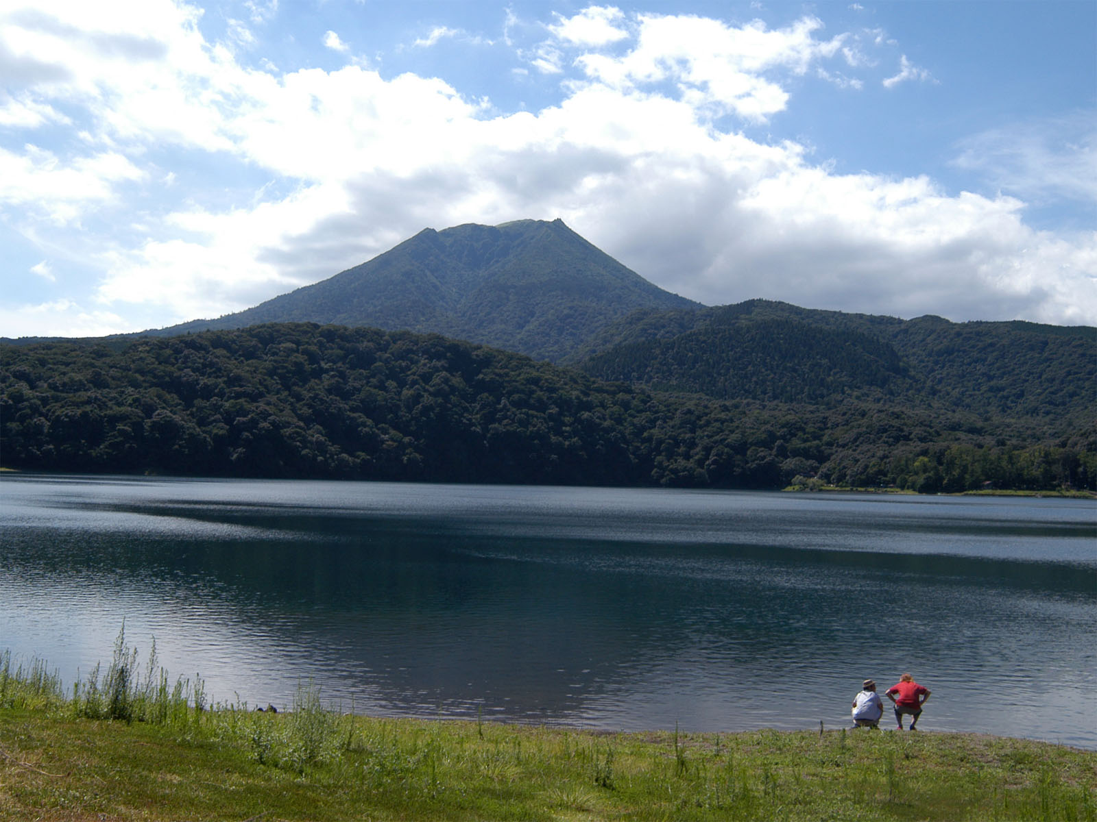 2004/08/13 投稿者による撮影 Miike in the front and Mount Takachiho in the back